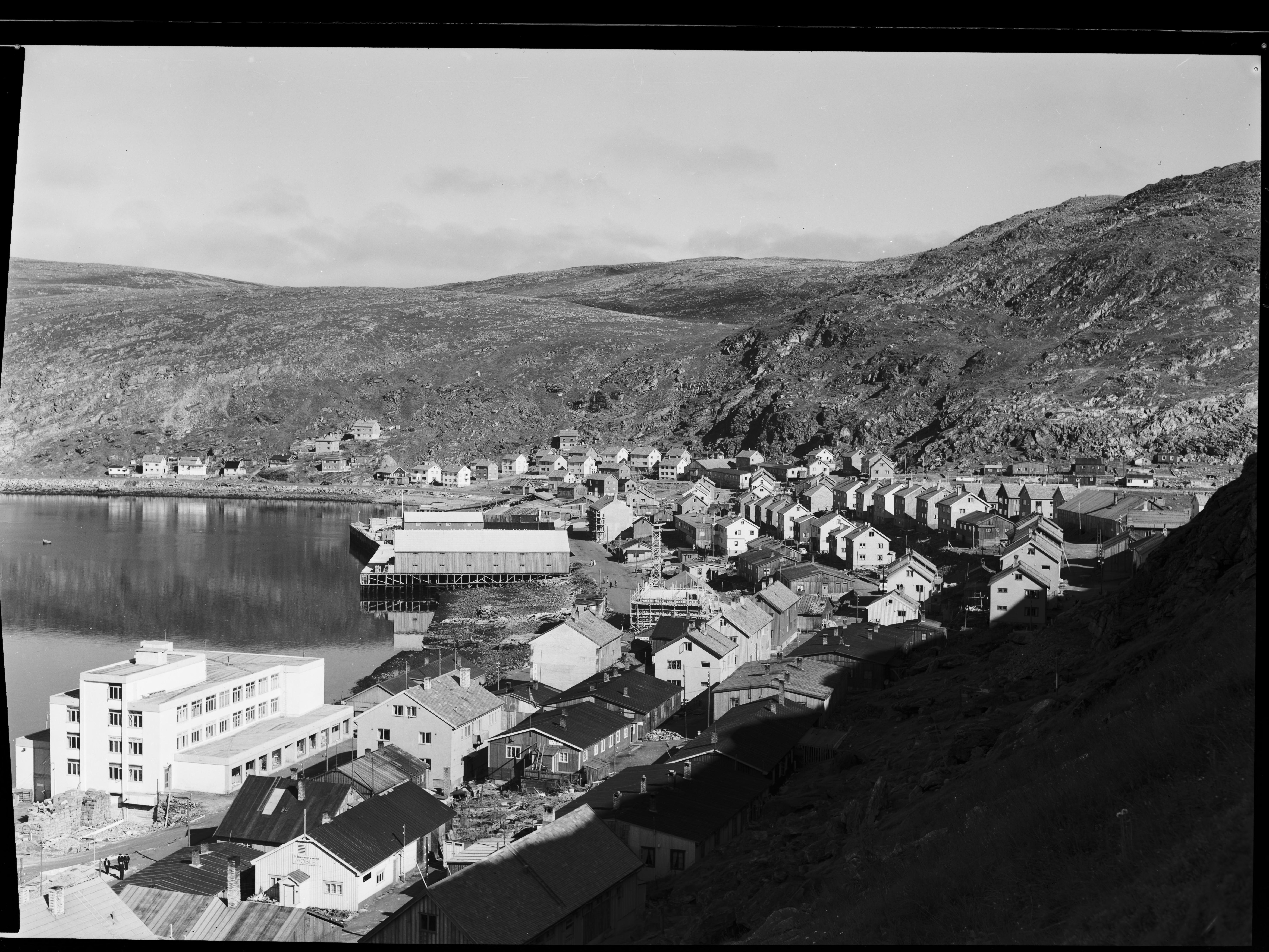 Bildet er hentet fra Nasjonalbibliotekets bildesamling. Anmerkninger til bildet var: fotograf ukjent Hammerfest, Hammerfest, Finnmark